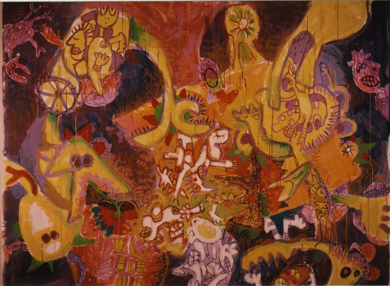 Tableau: Tohu-Bohu